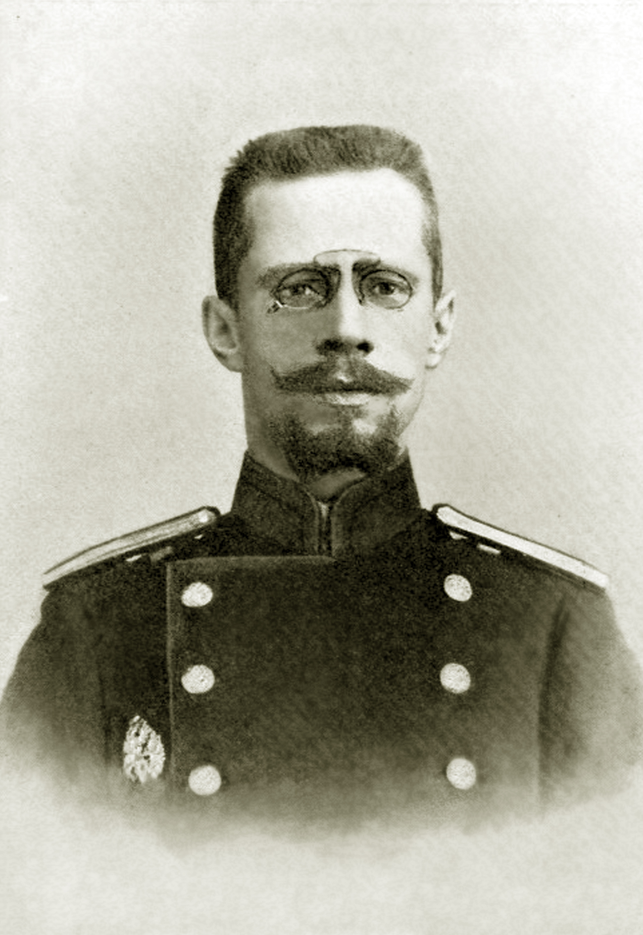 Профессор Эдуард Эдуардович Гартье в год выпуска из Императорской Военно-медицинской академии. Архив кафедры детских болезней ВМА